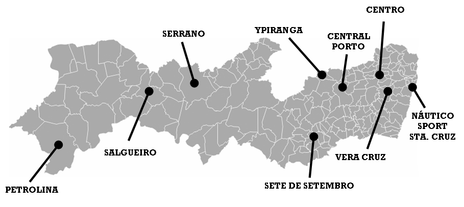 Mapa com as origens das equipes que disputam a Série A1 do Campeonato Pernambucano 2008